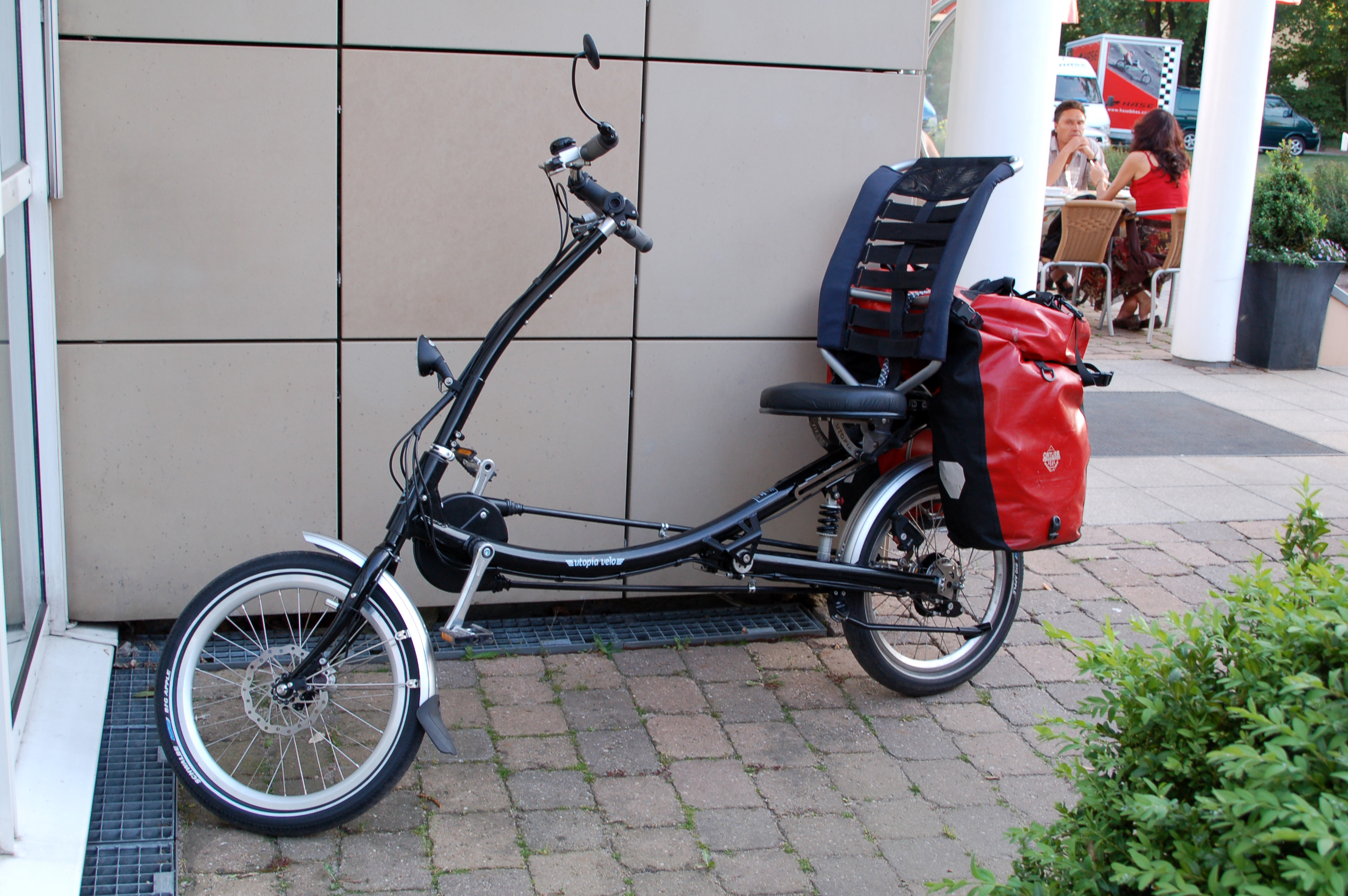 Sesselrad „Phoenix“ von Utopia Velo